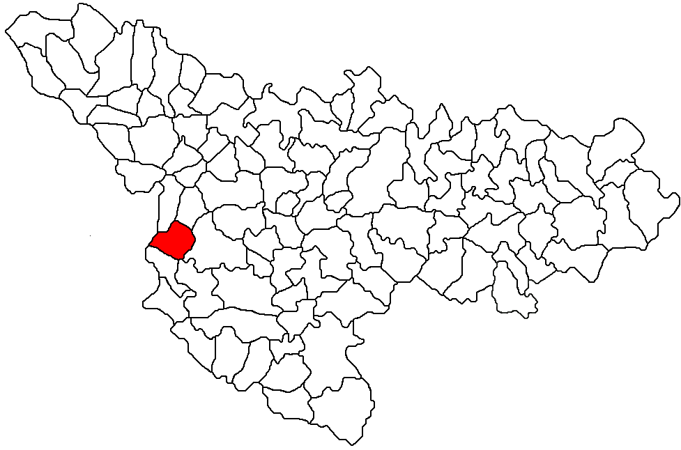 Categorie:Hărţi ale judeţului Timiş